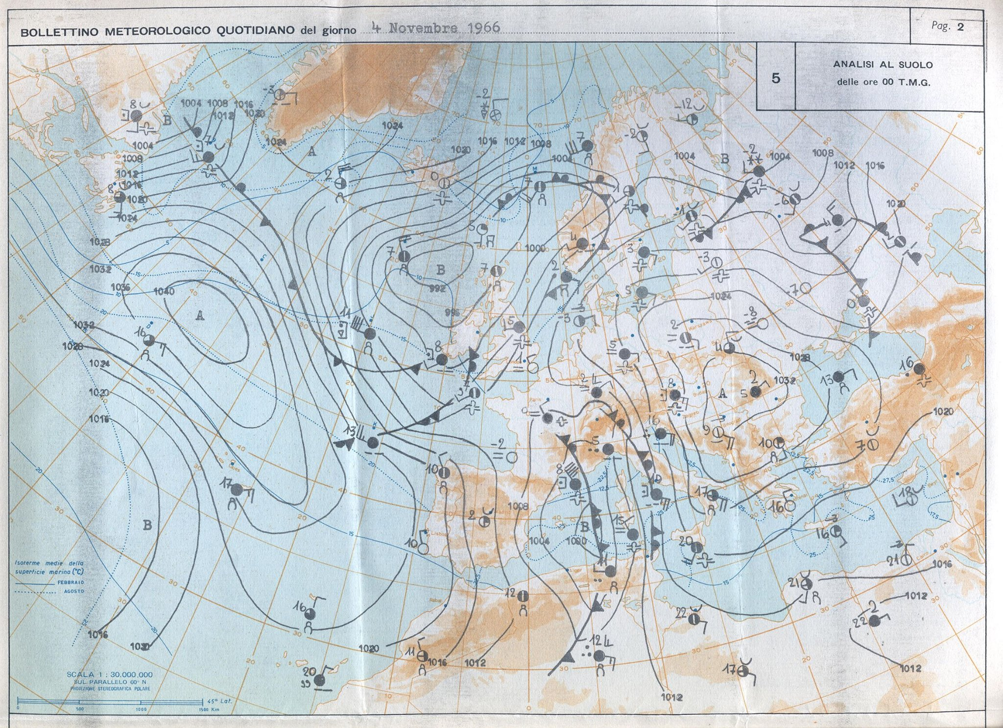 Bollettino meteorologico quotidiano del giorno 4 novembre 1966